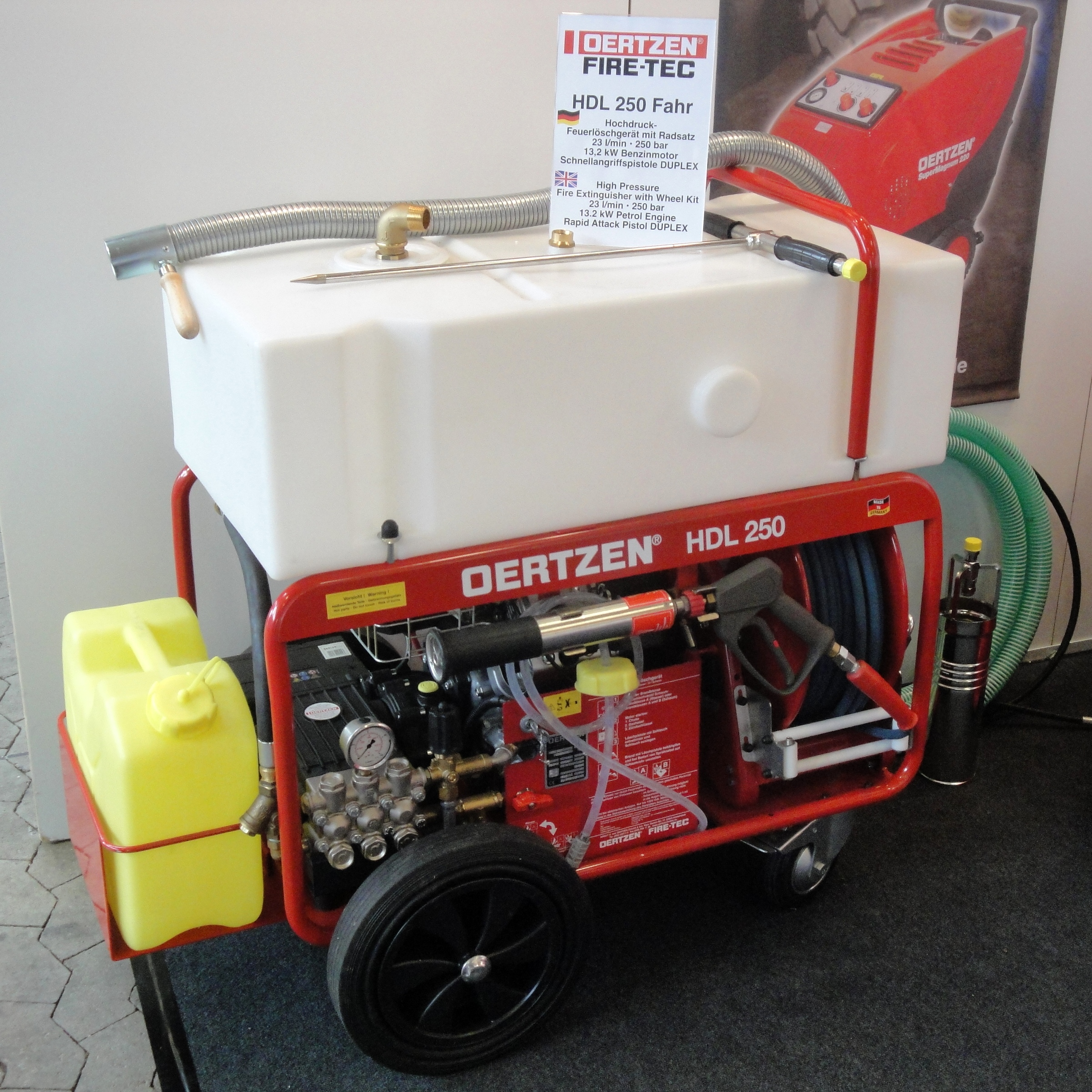 Hochdruck-Löschgerät Oertzen Fire-Tec HDL 250 Fahr (Minimax), Internationale Fachausstellung Bergen und Abschleppen 2016, Kassel